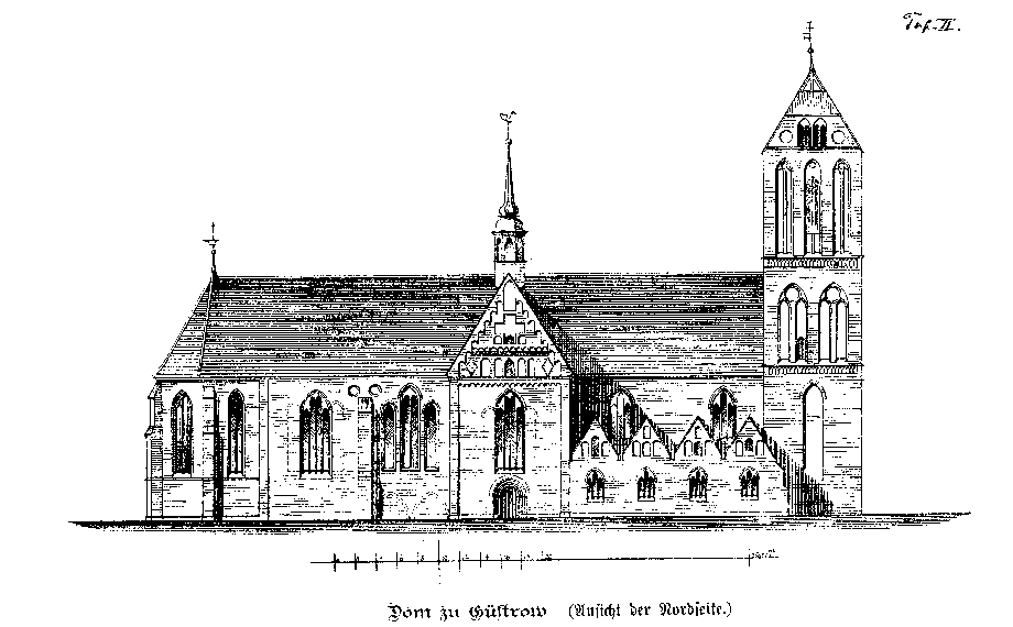 Nordansicht des Domes zu Güstrow